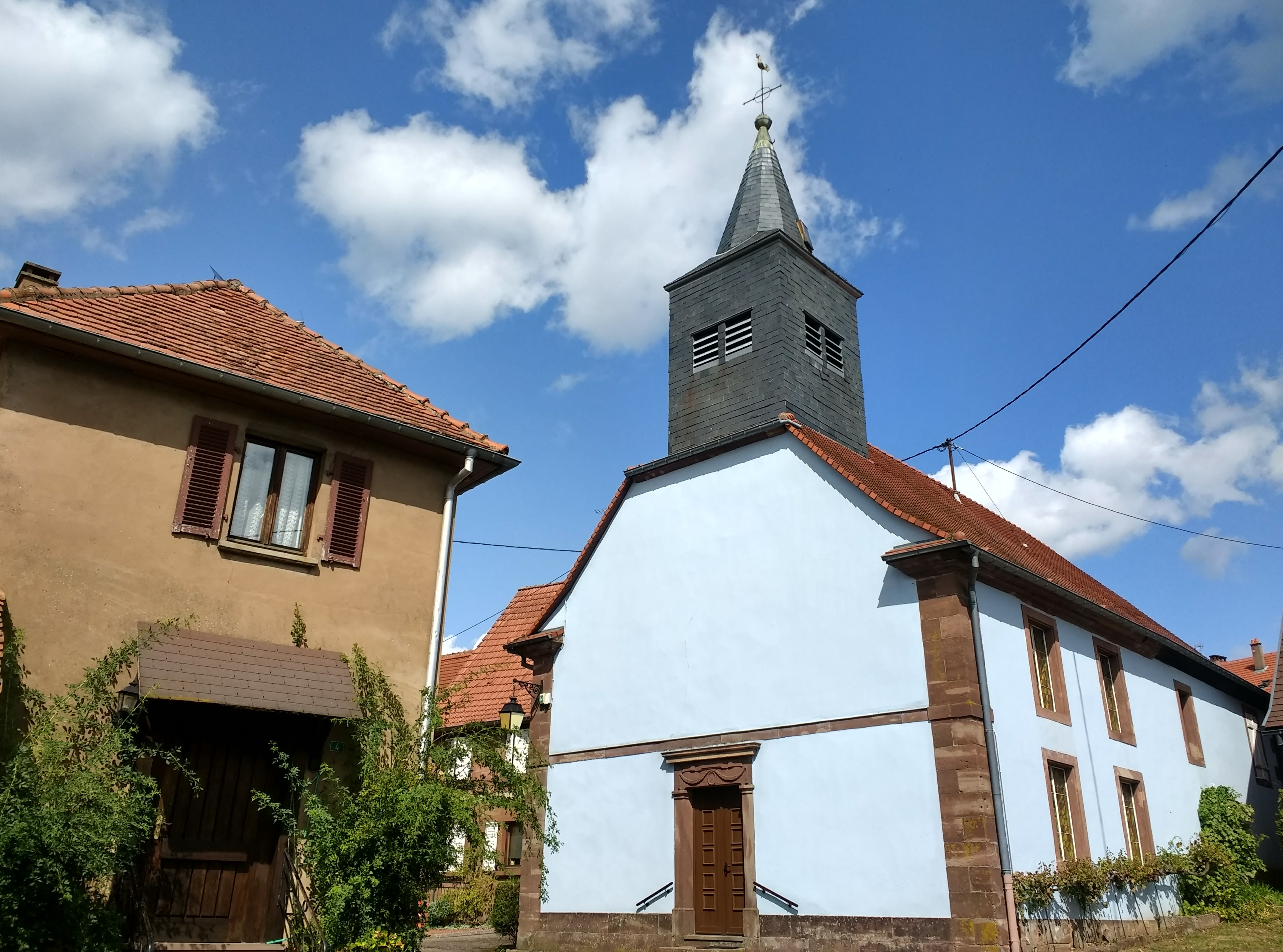 Église de Hinsbourg